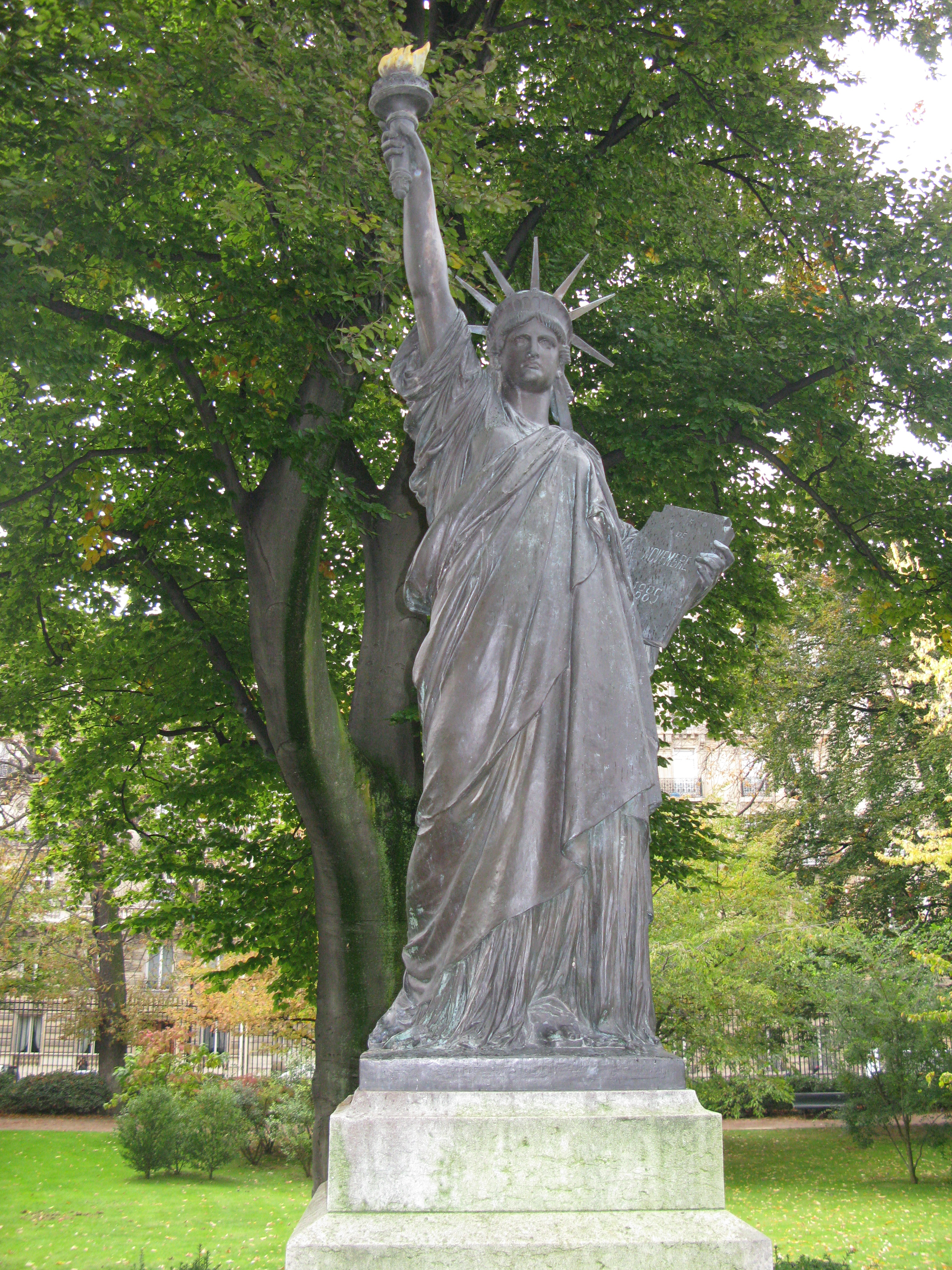 La statue de la liberté du jardin du Luxembourg, de Frédéric Bartholdi, à Paris, 2010